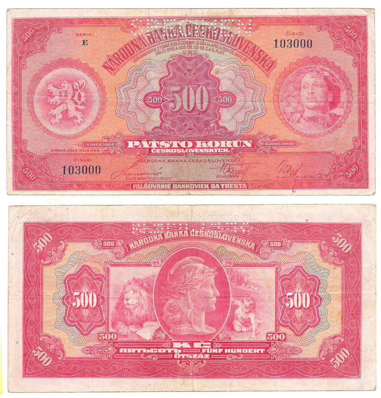 500 korun Česko-Slovenských z roku 1929This image is the reverse of a 1923 500 Korun note (P-21) designed by Alfons Mucha (1860-1939) and issued by the Czechoslovak National Bank.